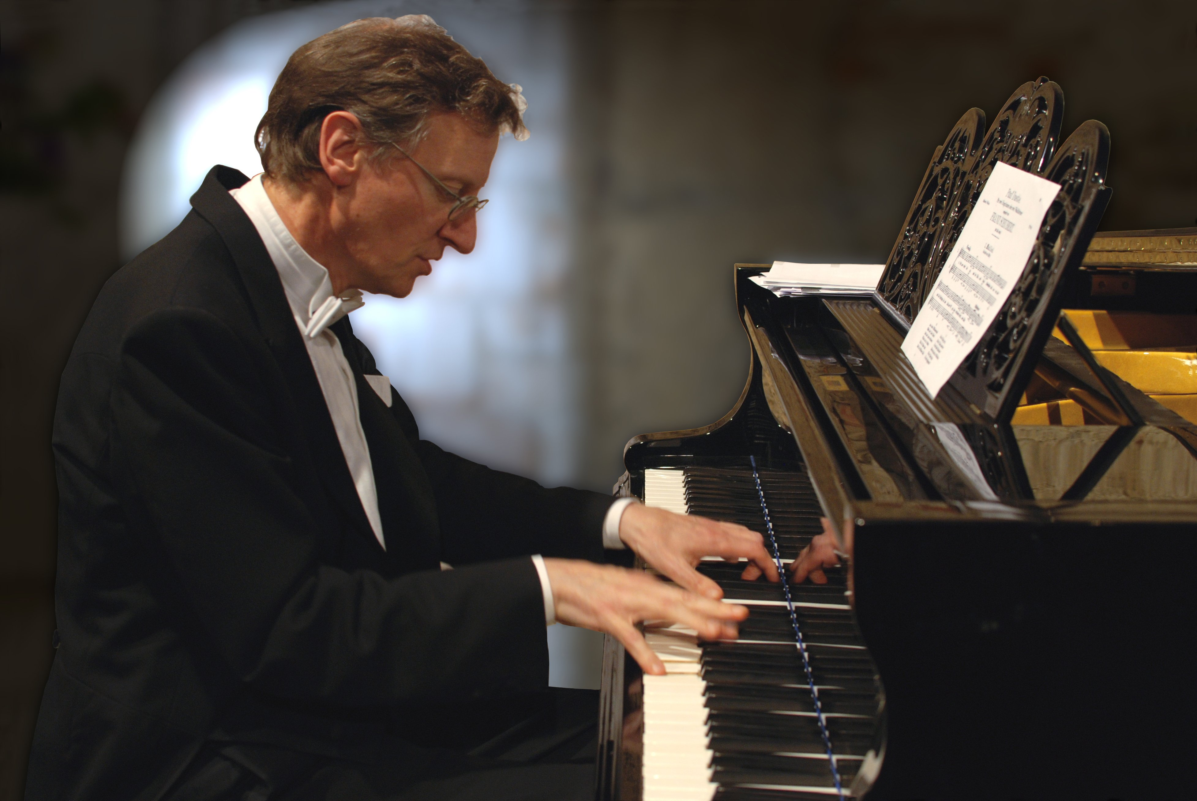 Pianist Detlev Eisinger bei einem Konzert in Gauting Frühjahr 2011